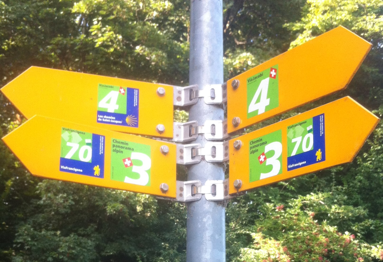 Señalización de la Vía Francígena entre St. Sulpice y Lausana